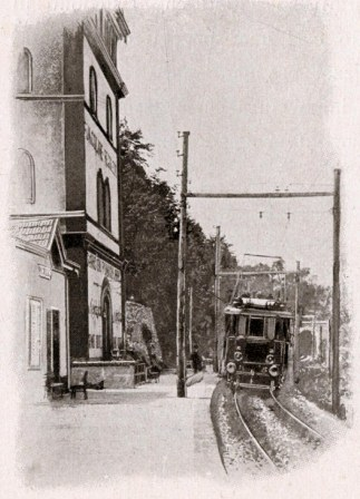 Fermata ferroviaria di Regoledo